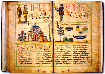 Букварь Кариона Истомина. Буквы Ц, Ч